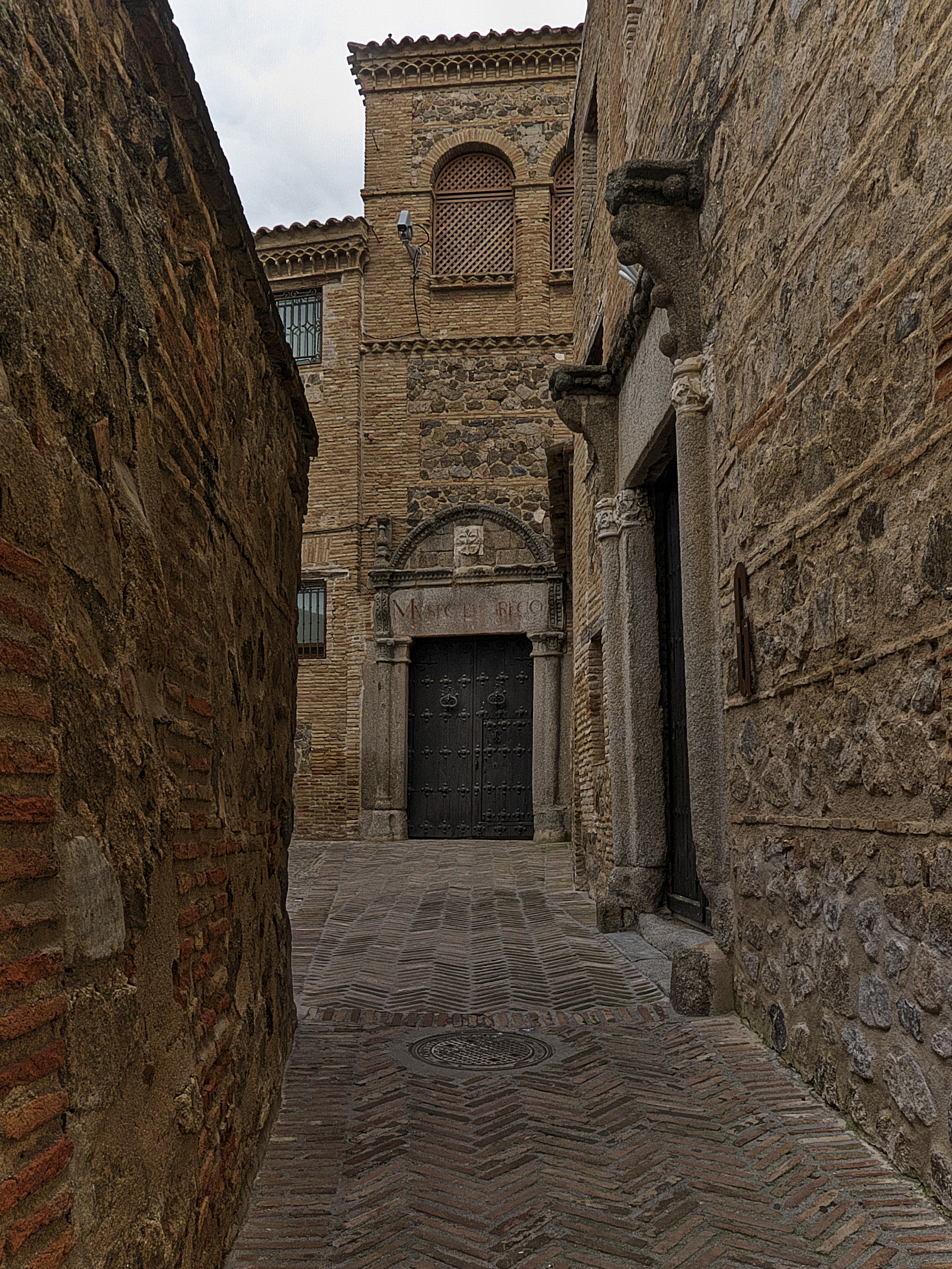 En la judería de Toledo, la posible casa en la que vivió Il Greco. Una iniciativa del marqués de la Vega-Inclán con la colaboración de Eladio Laredo.